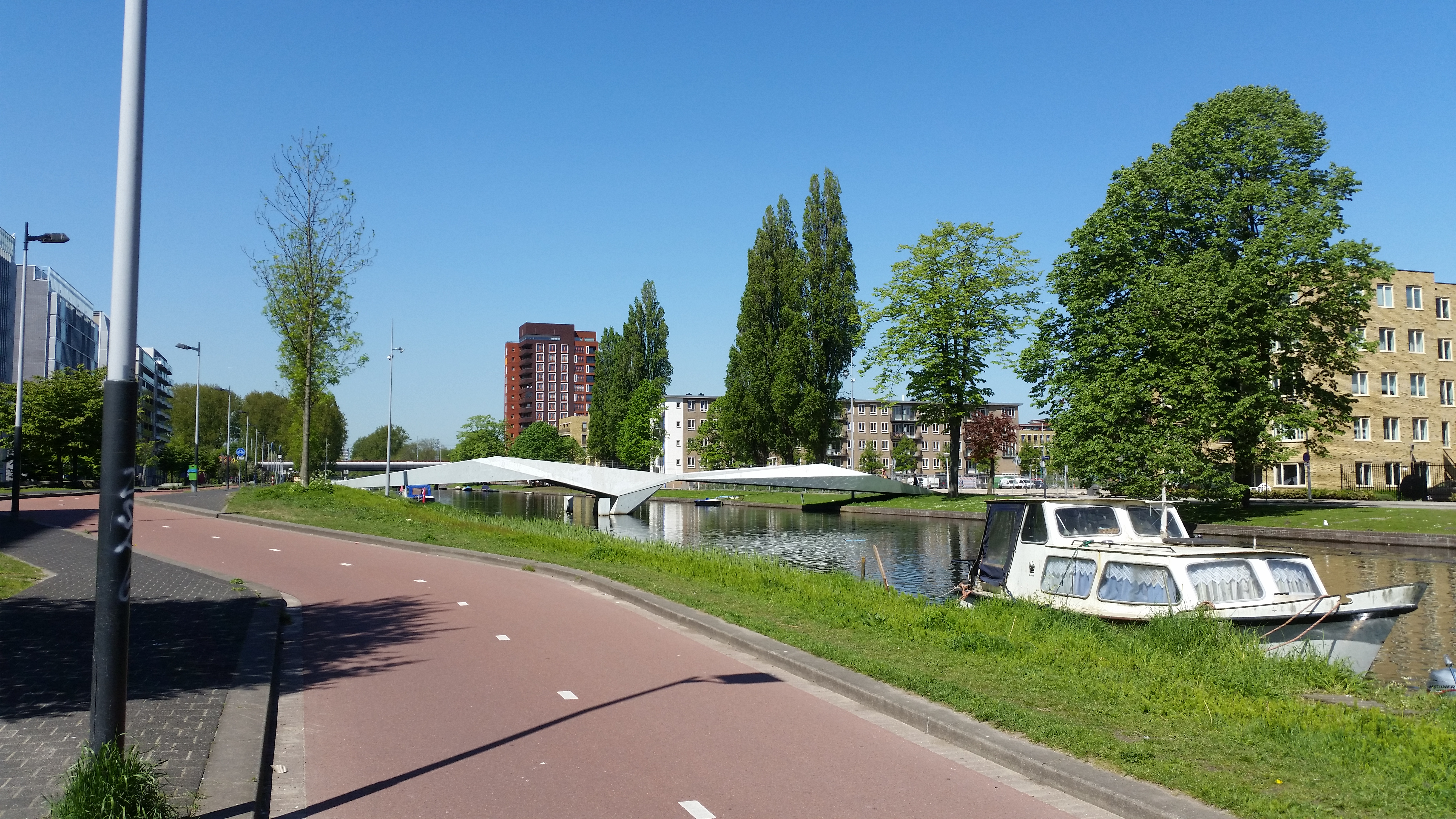 Voet- en fietsbrug over de Erasmusgracht, Amsterdam Nieuw-West